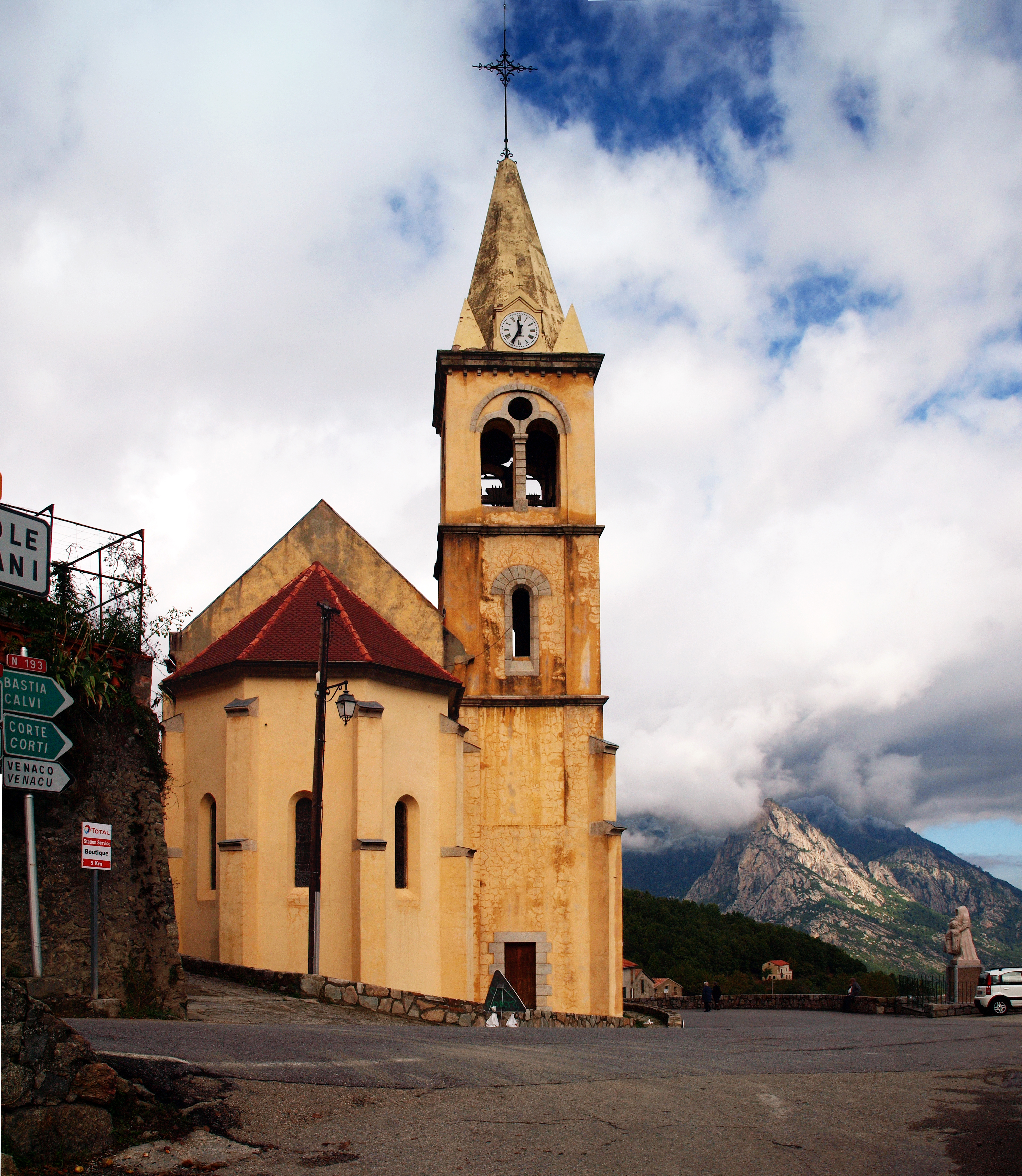 Vivario, Centre Corse (Corsica) - Église paroissiale Saint Pierre-aux-liens